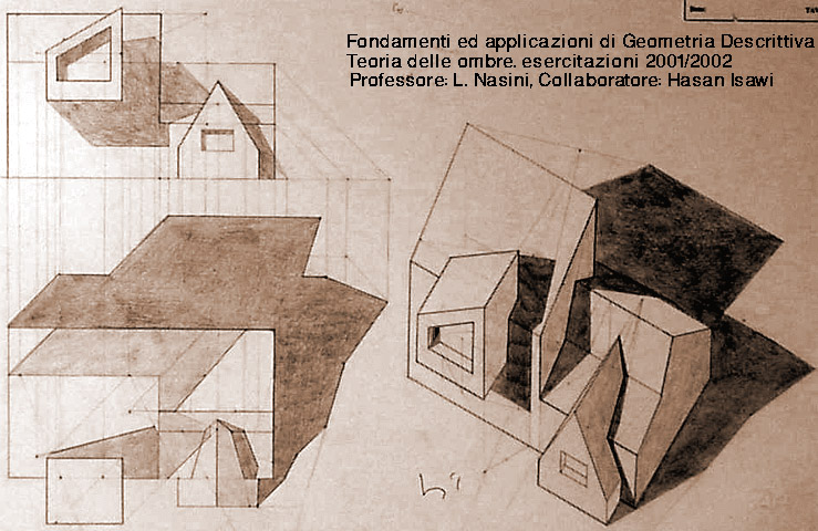 Università la sapienza di Roma facoltà di architettura, Valle Giulia Fondamenti ed applicazioni di Geometria Descrittiva Prof. Lamberto Nasini, collaboratore Hasan Isawi Esercitazione 2001/2002 Teoria delle ombre, applicazioni nei metodi delle proiezioni ortogonali e in assonometria cavaliera militare